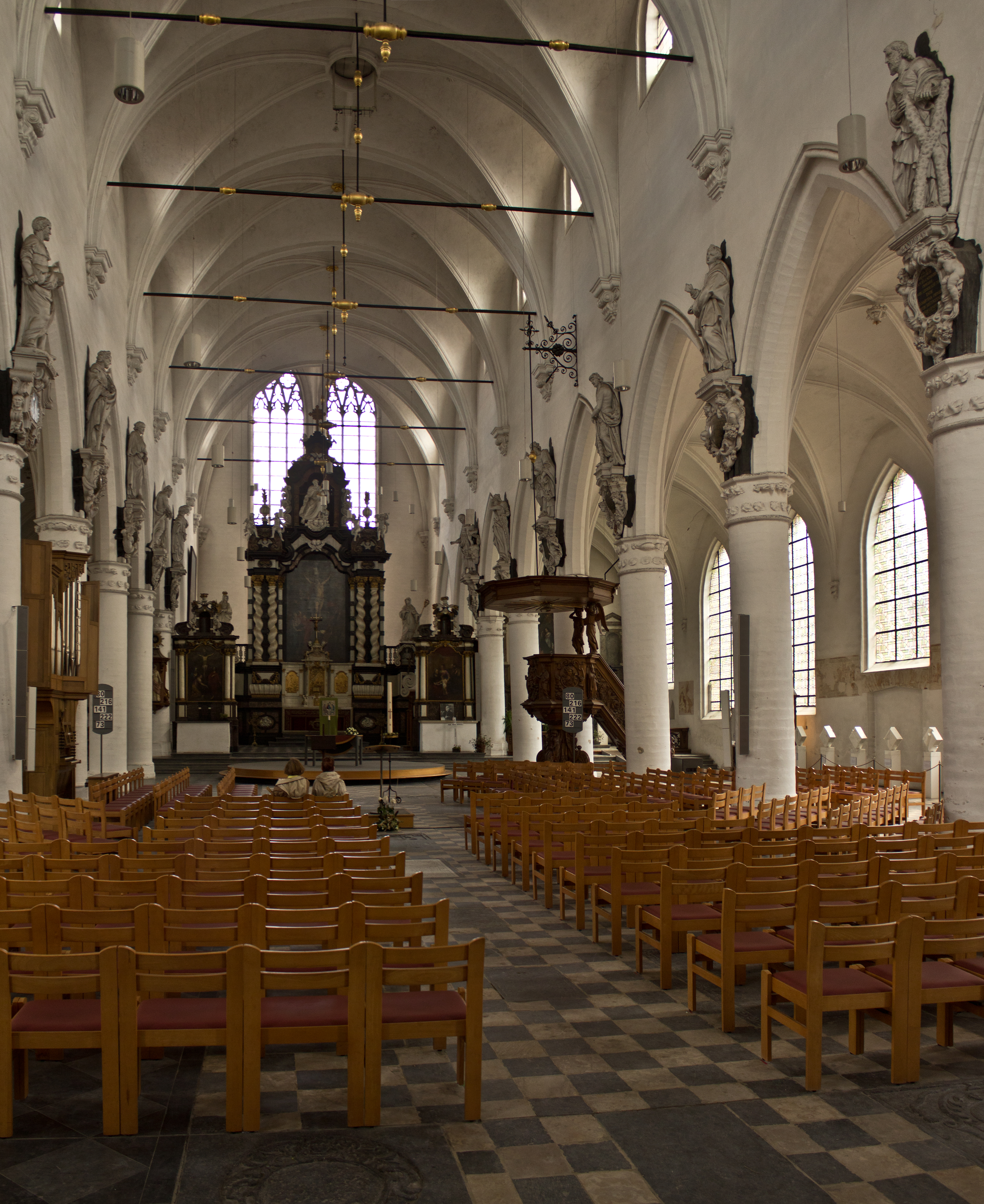 Interieur van de begijnhofkerk Sint-Jan de Doper, Leuven